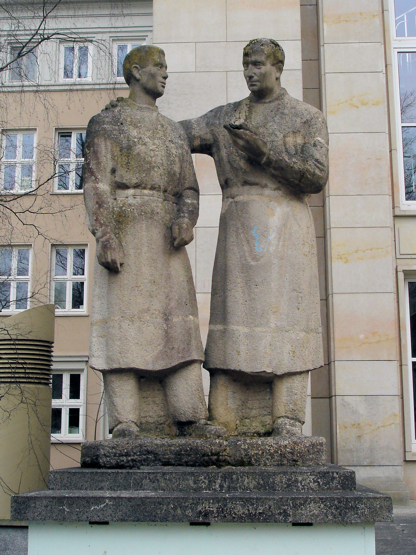 Betonwerksteinskulptur "Lehrer-Student" von Reinhard Schmidt in Rostock